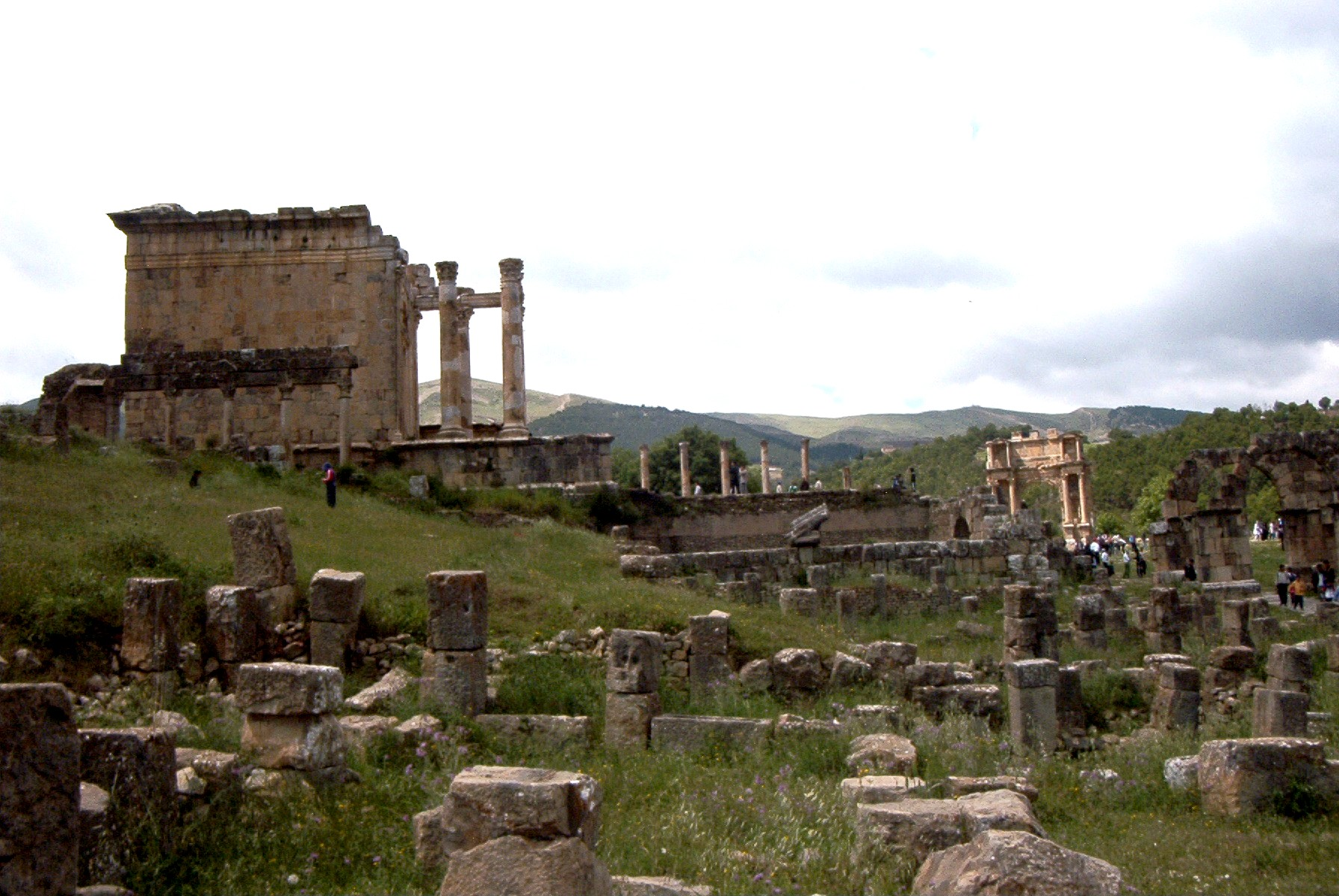 Djémila, le temple Septimien vu depuis la rue du théâtre